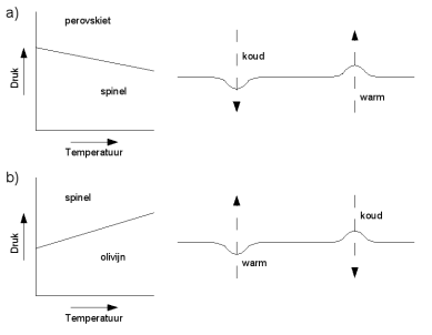 Druk-temperatuurdiagram en deflectie van fase-overgangen in de aardmantel voor endotherme en exotherme overgangen.